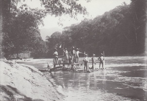 Viaje al Marañón